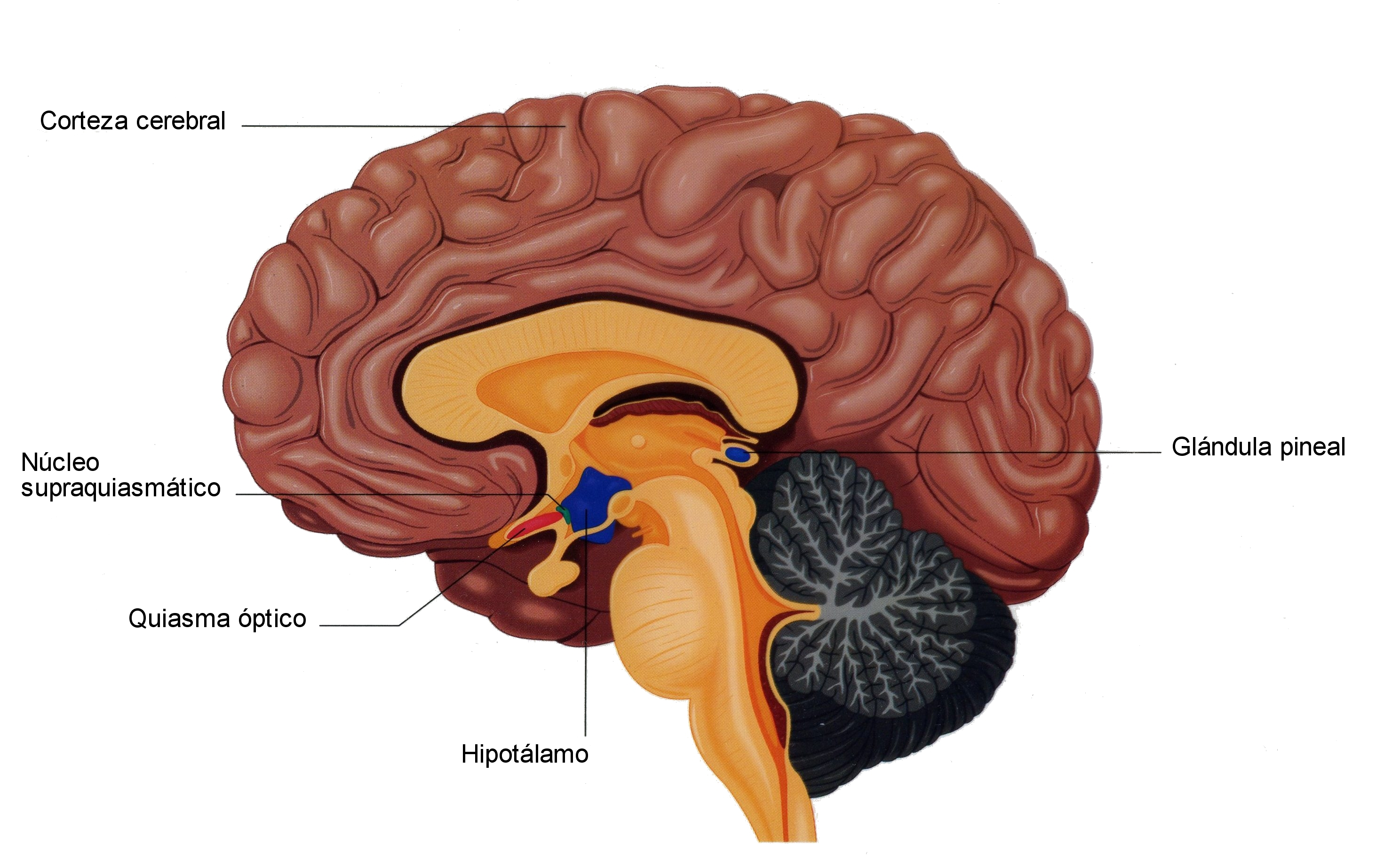 En el esquema se representa la corteza cerebral y la localización del hipotálamo,, quiasma óptico, hipotálamo, núcleo supraquiasmático y glándula pineal.